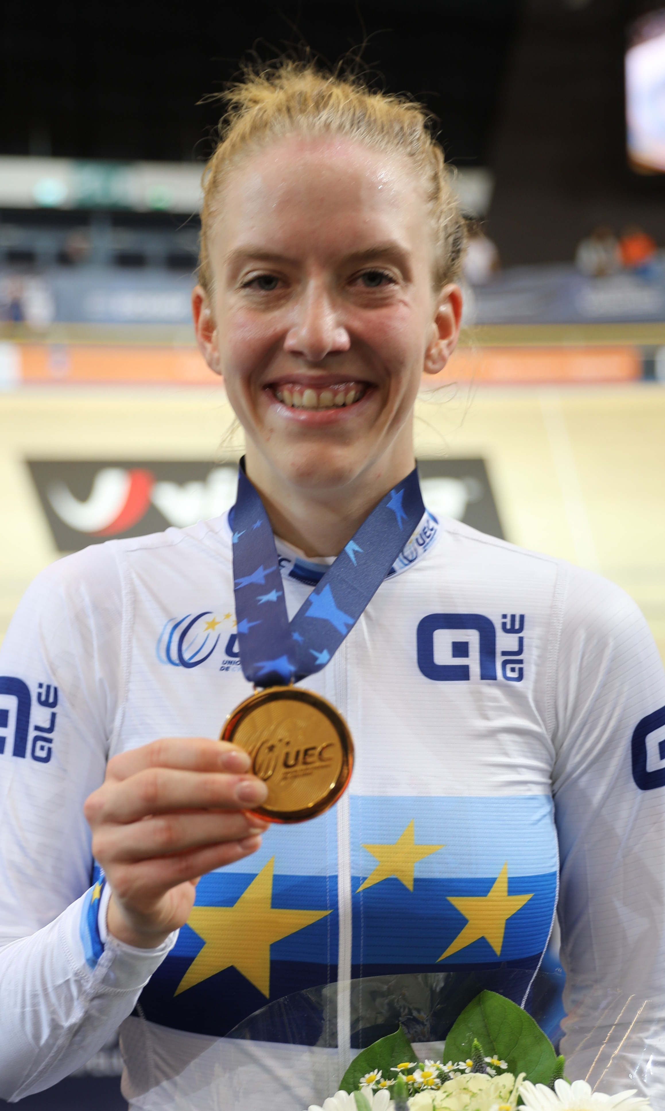 Franziska Brauße, deutsche Radsportlerin - EM-Gold in der Einerverfolgung